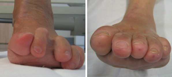 a) Luxierte Zehen bei Rheumatoider Arthritis b) Reponierte Zehen II–V nach Stainsby-OP